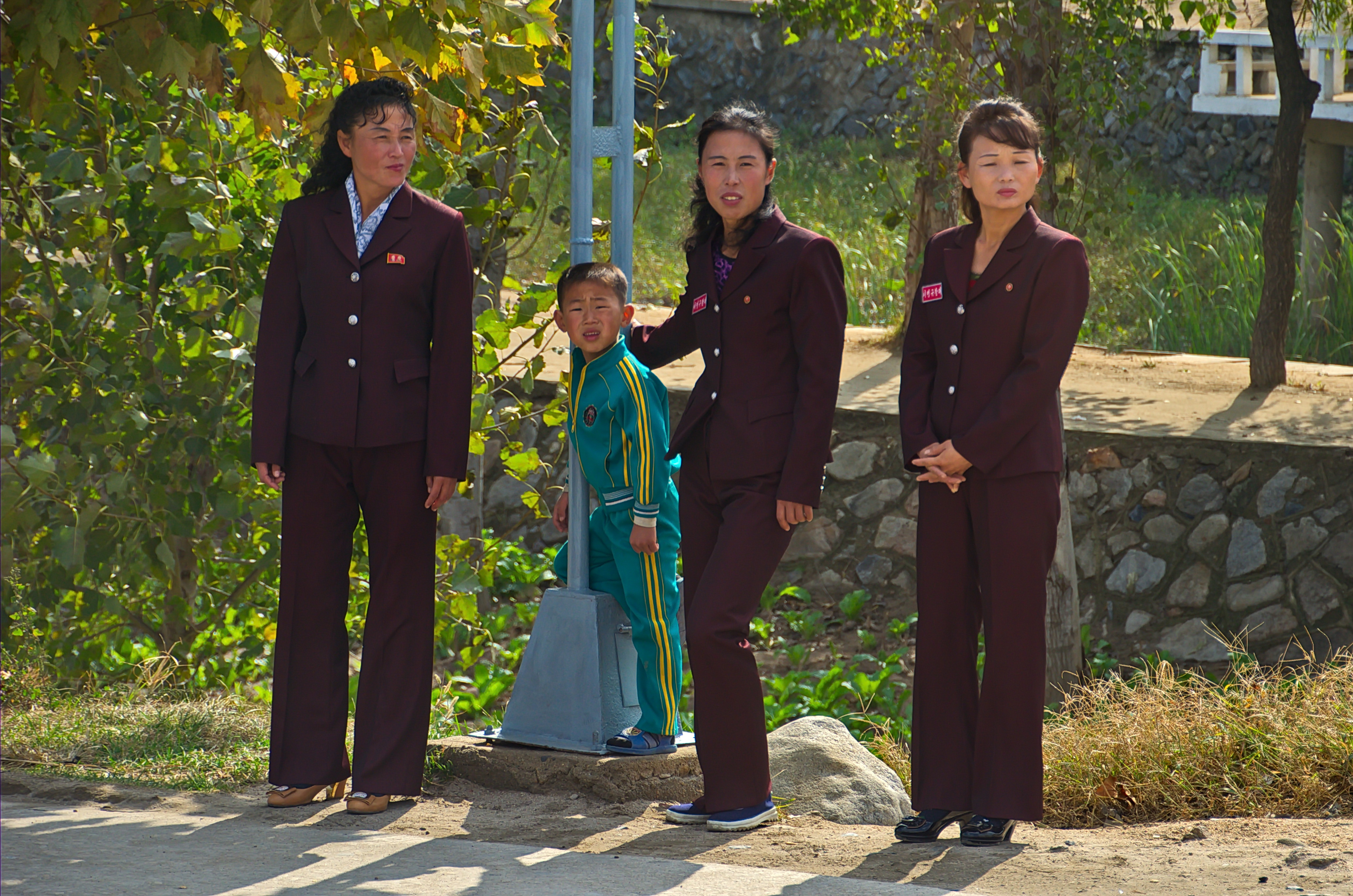 Nordkorea 2015 - von Nampo nach Käsong